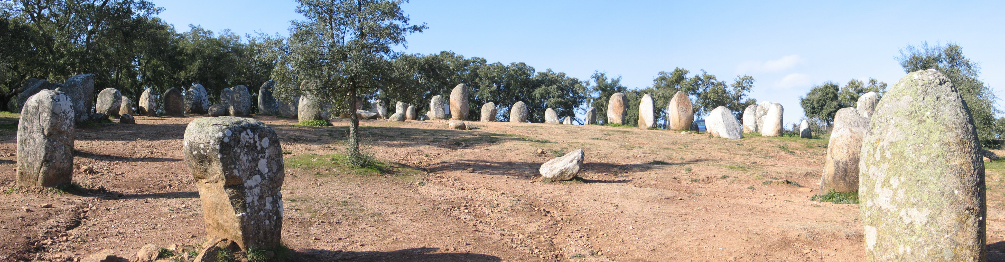 Almendres cromelech, Évora, Portugal